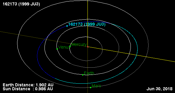 (162173) 1999 JU3 orbit